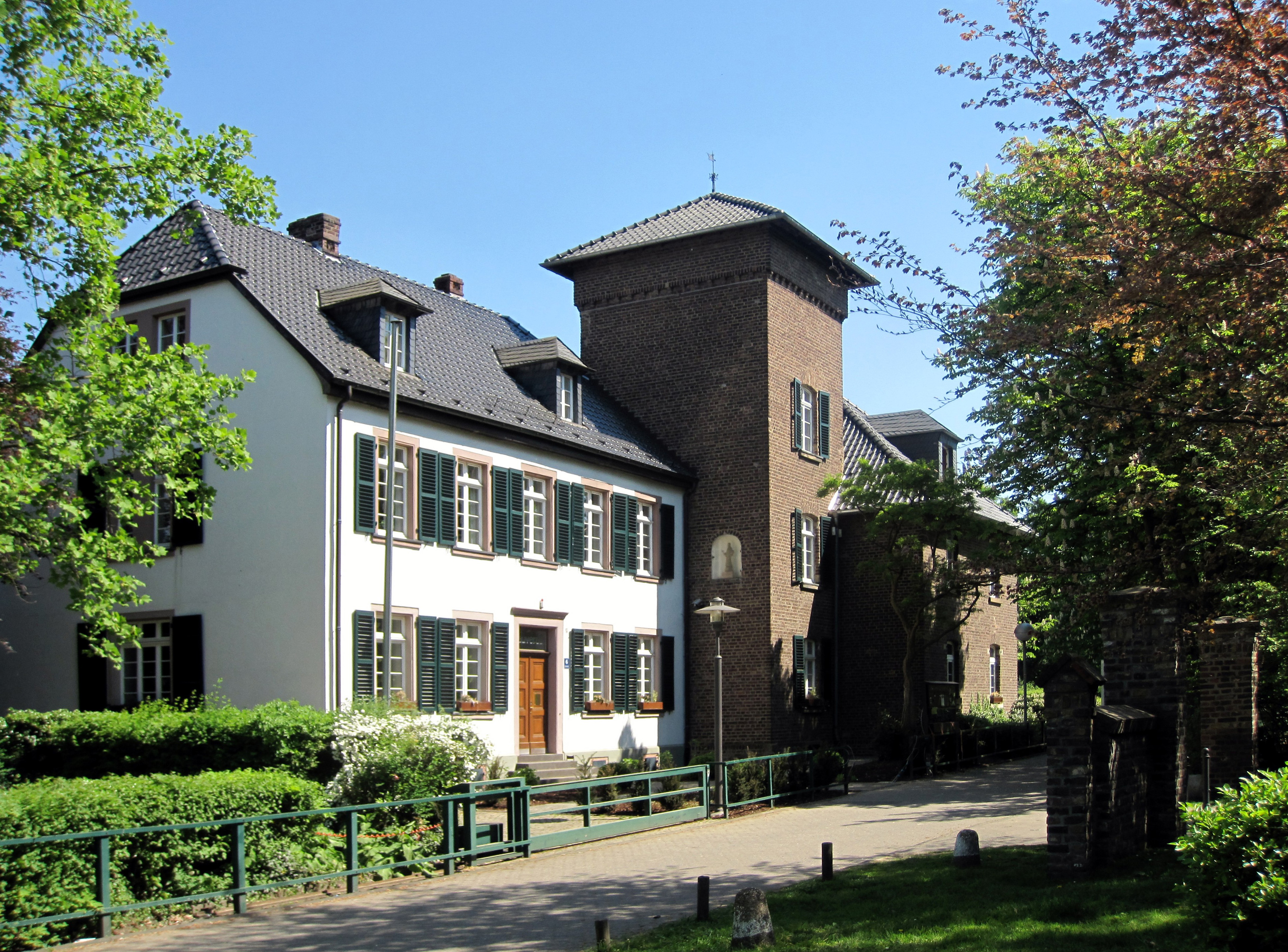 Liblar Fritz-Erler-Straße 6